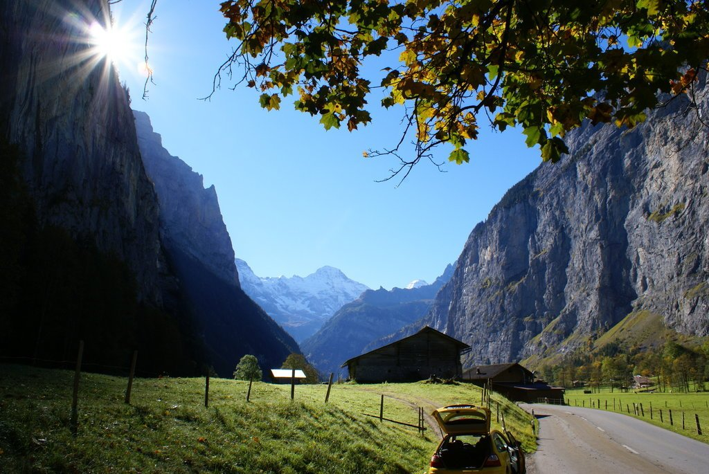 Lauterbrunnental, view towards Trümmelbach